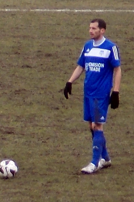 Fotografia fotbalistului Robert Neagoe